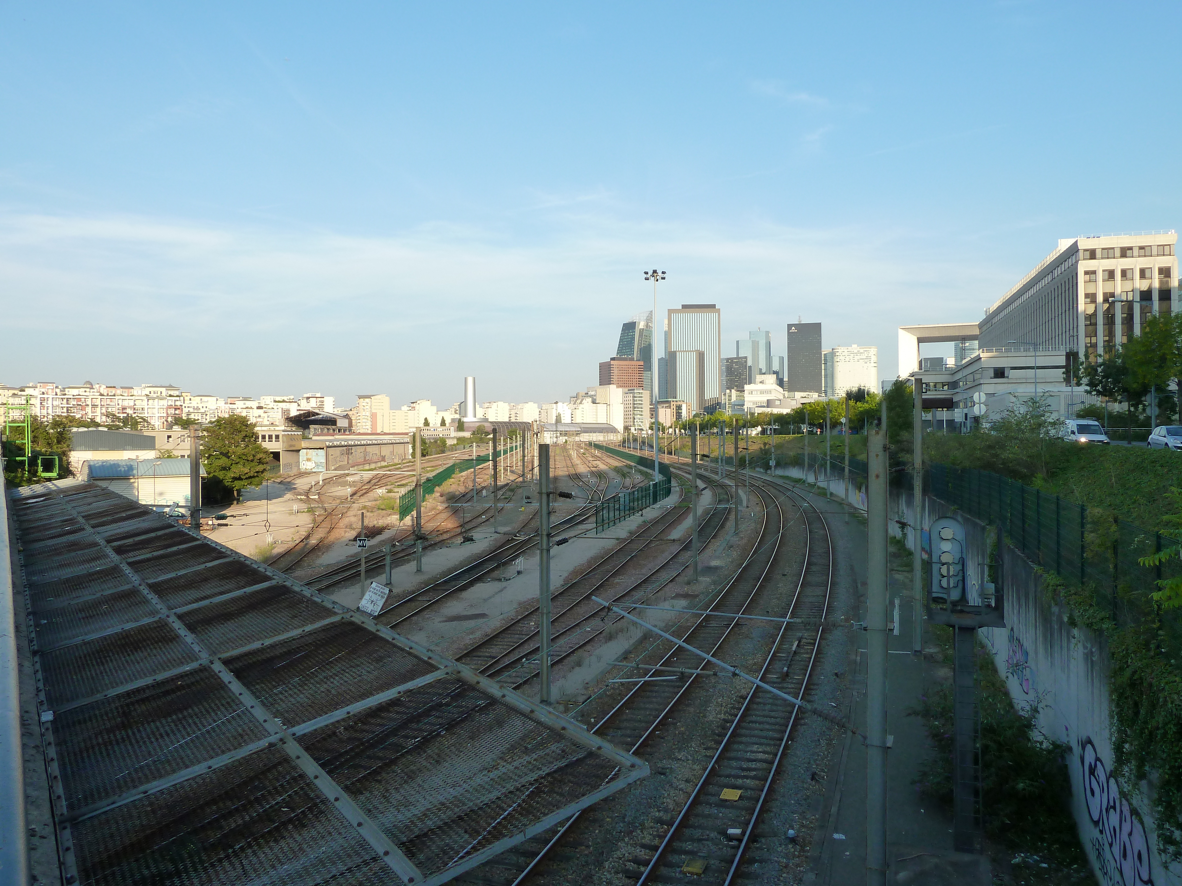 Vue des voies de Nanterre - La Folie depuis le pont de la rue de la Garenne à Nanterre, vers l'est.